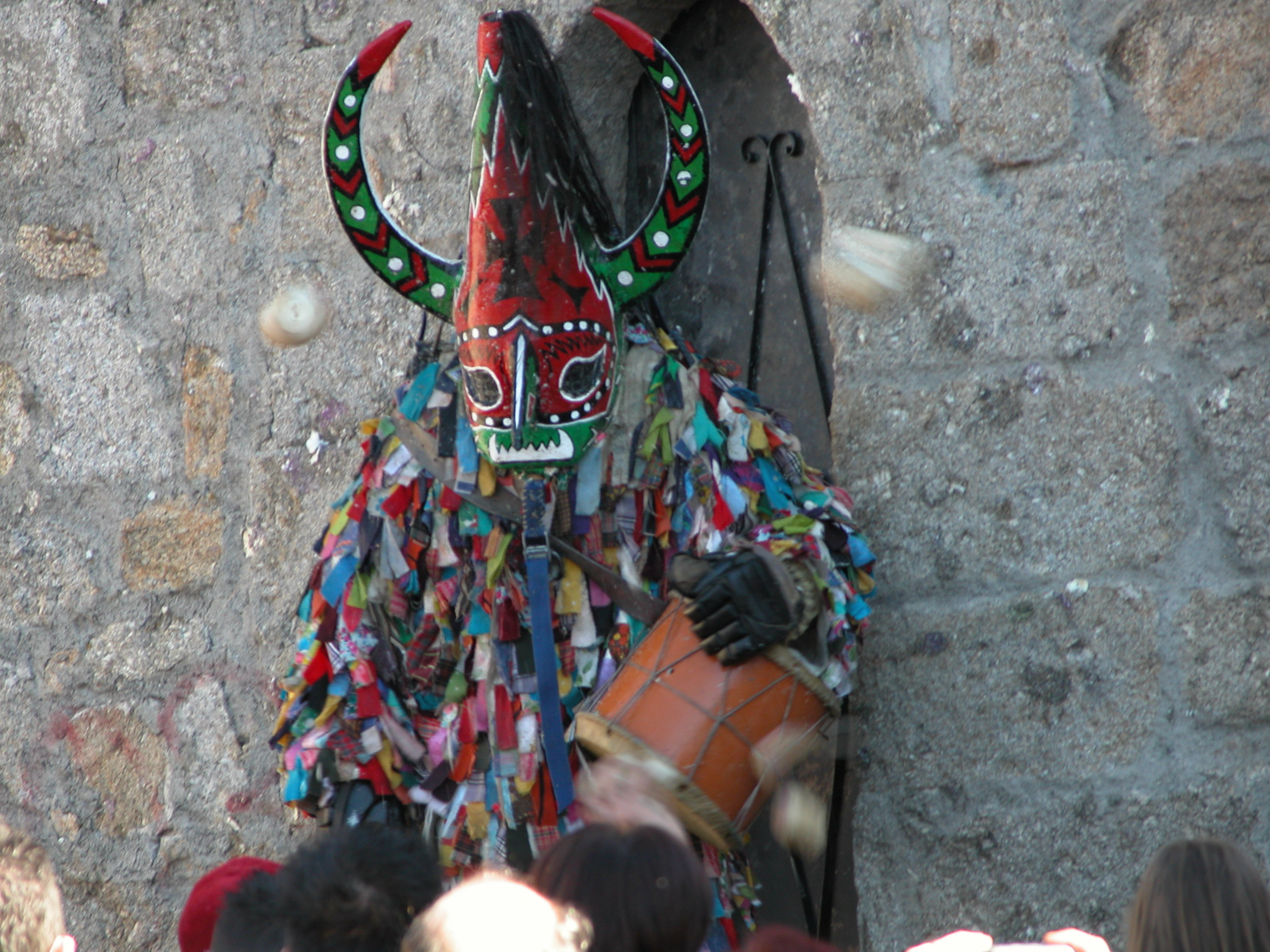 Jarramplas en el campanario de Piornal